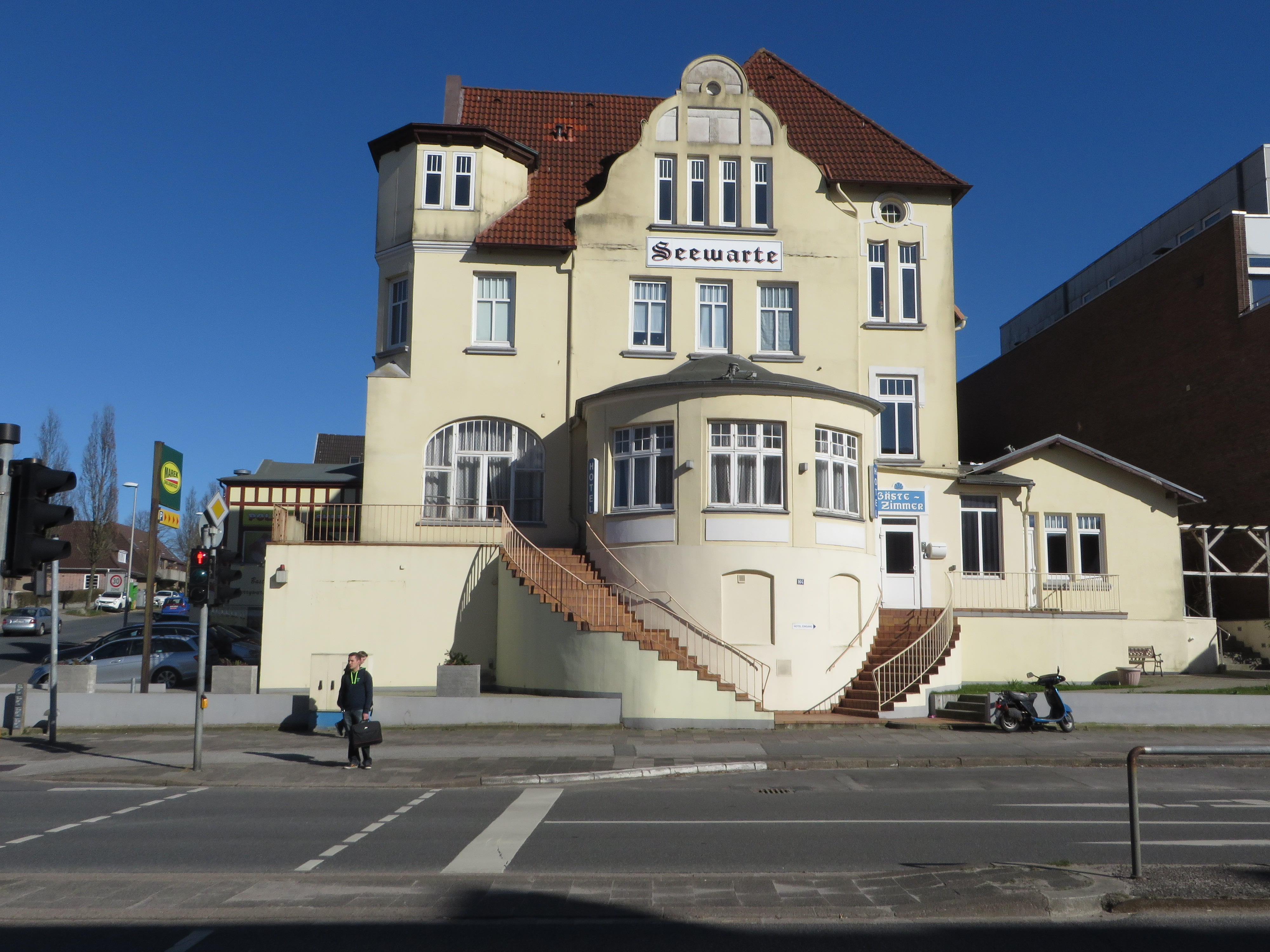 Das Hotel Seewarte (Flensburg-Mürwik am 4 April 2015), Bild 02